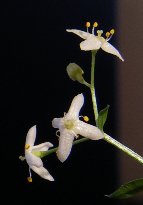 Galium odoratum. Moscow region, Russia